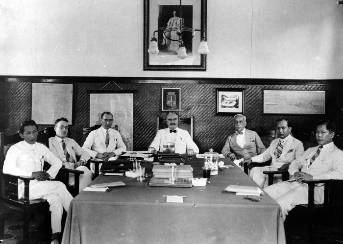 Repronegatief. Vergadering van het College van Burgemeester en Wethouders, met in het midden de burgemeester van Batavia, Mr. A. Meyroos